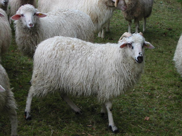 Waldschafe auf der Weide